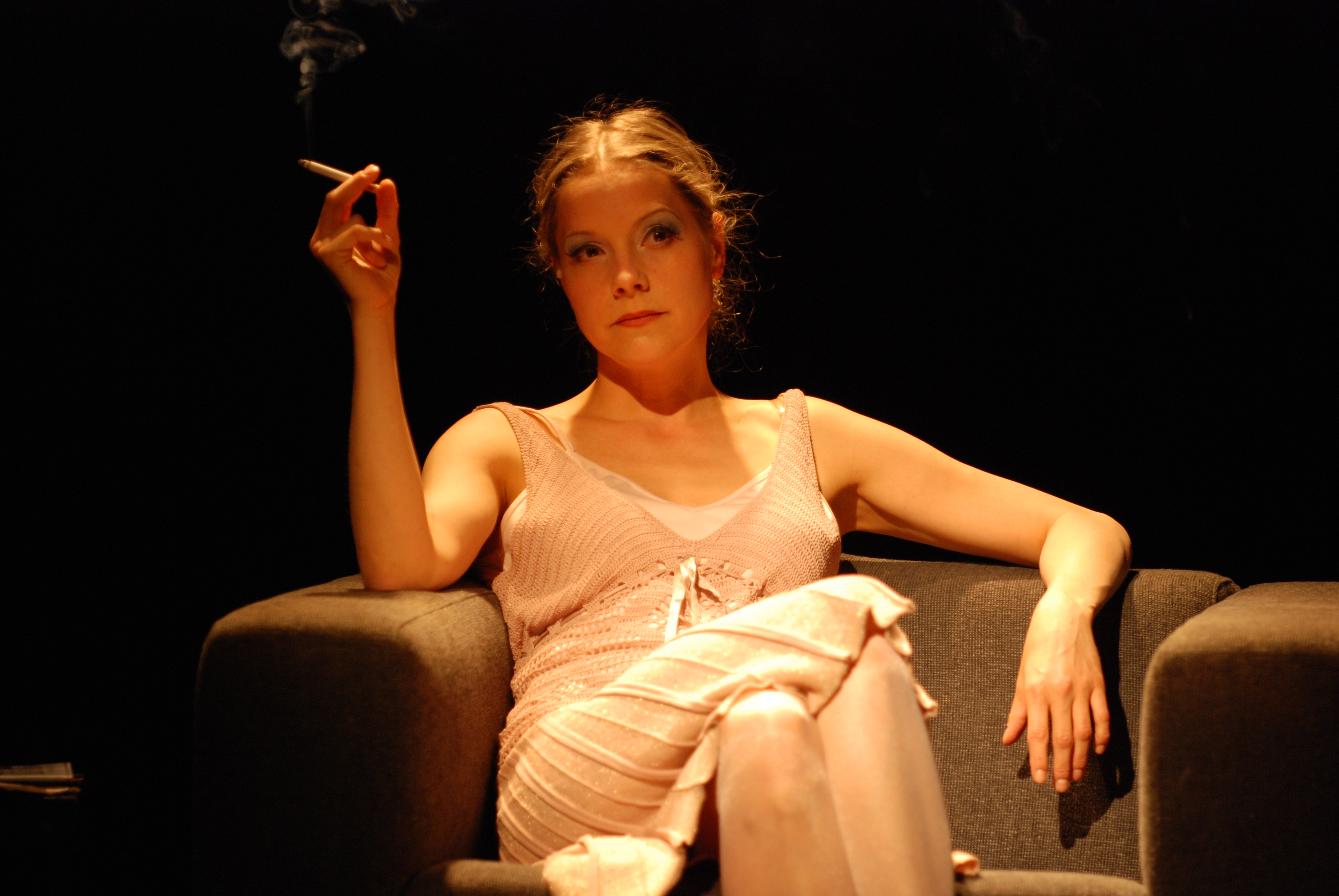 Fotografin Jessica Brauner